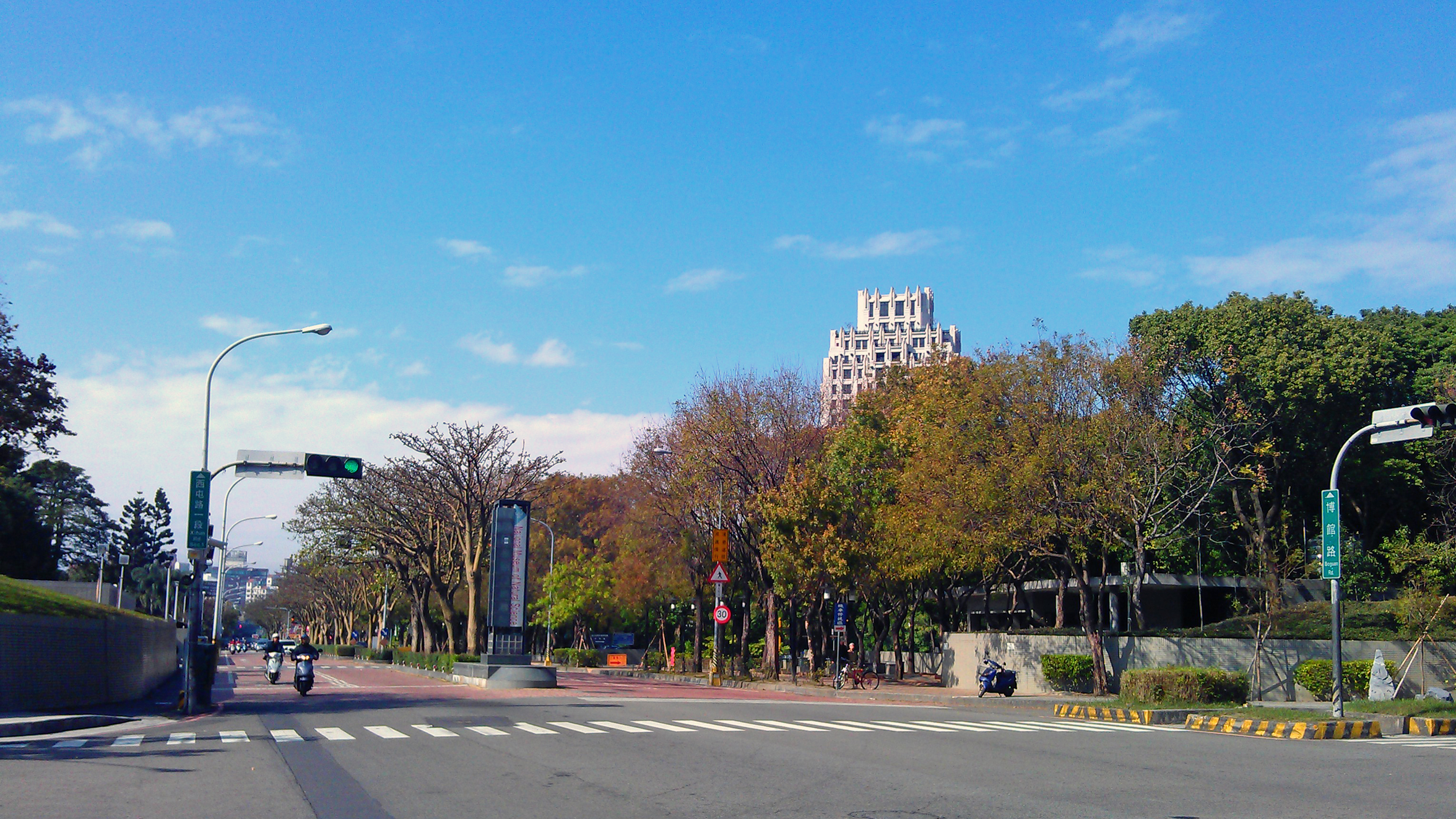 西屯路科博館段